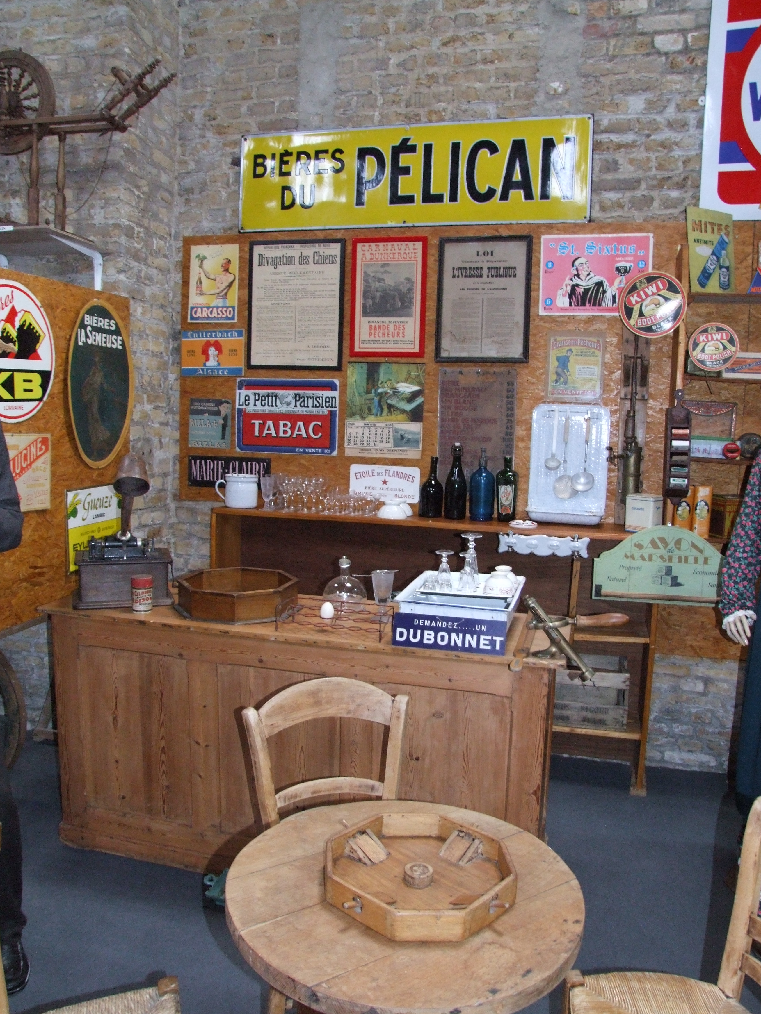 Écomusée du Bommelaers-Wall in Ghyvelde - kleine flandrische Kneipe